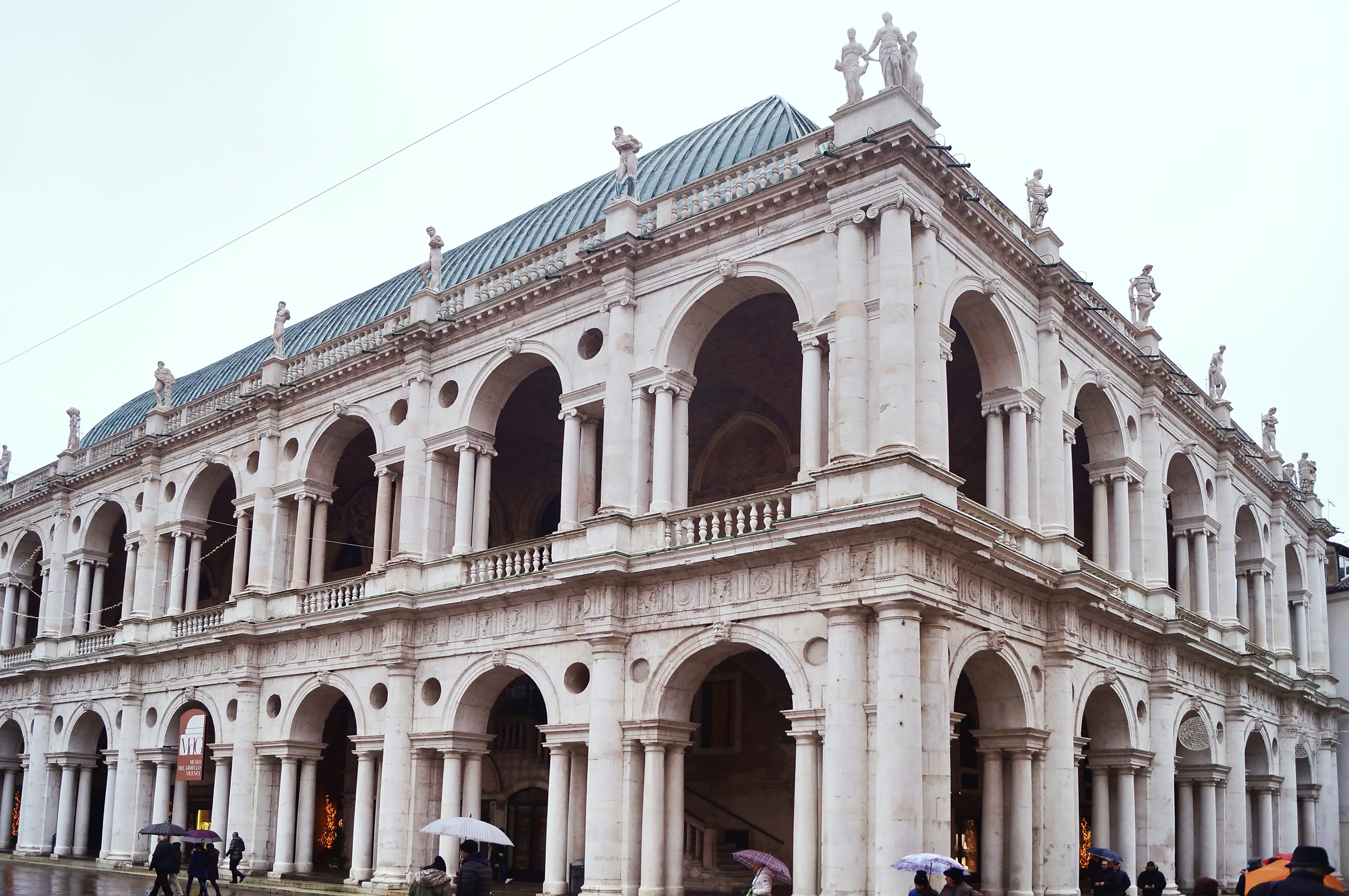 Basilica Palladiana This is a photo of a monument which is part of cultural heritage of Italy.